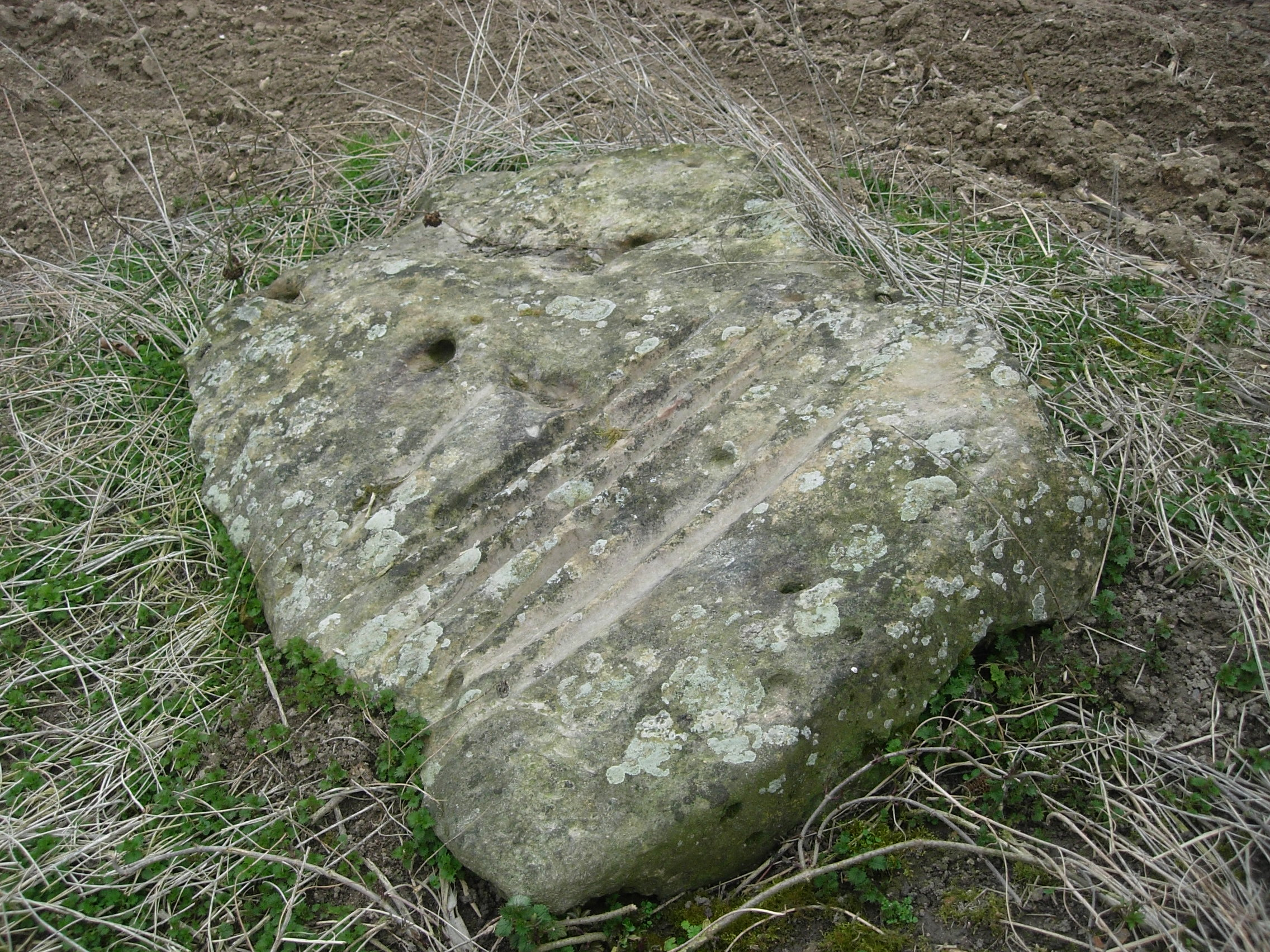 Polissoir de Souligny-les-étangs (Aube)